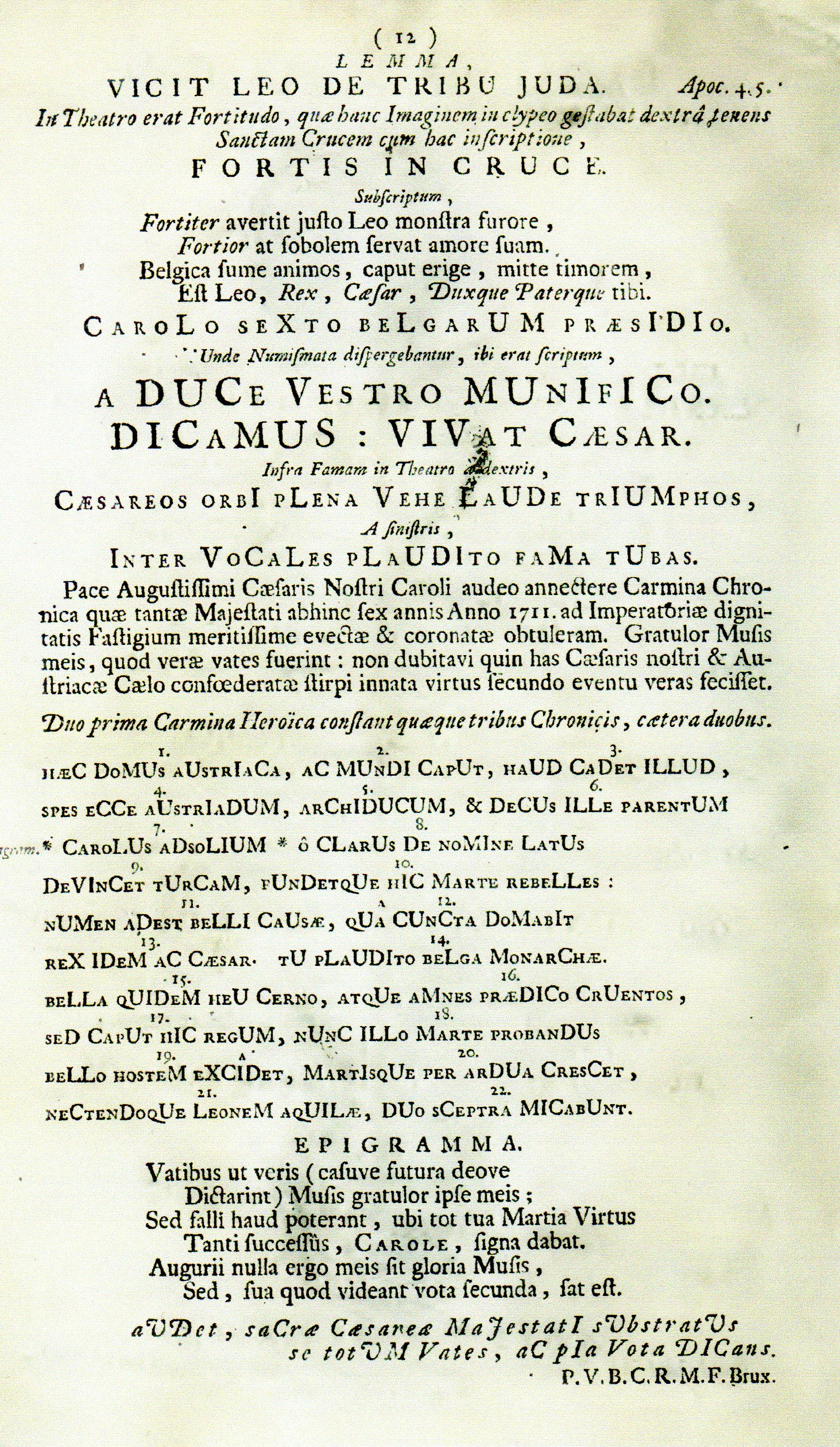 page 12 du livre du poète néo-latin Petrus Vander Borcht, Applausus chronographicus, Bruxellis, apus Josephum t'Serstevens, 1707, page 12.